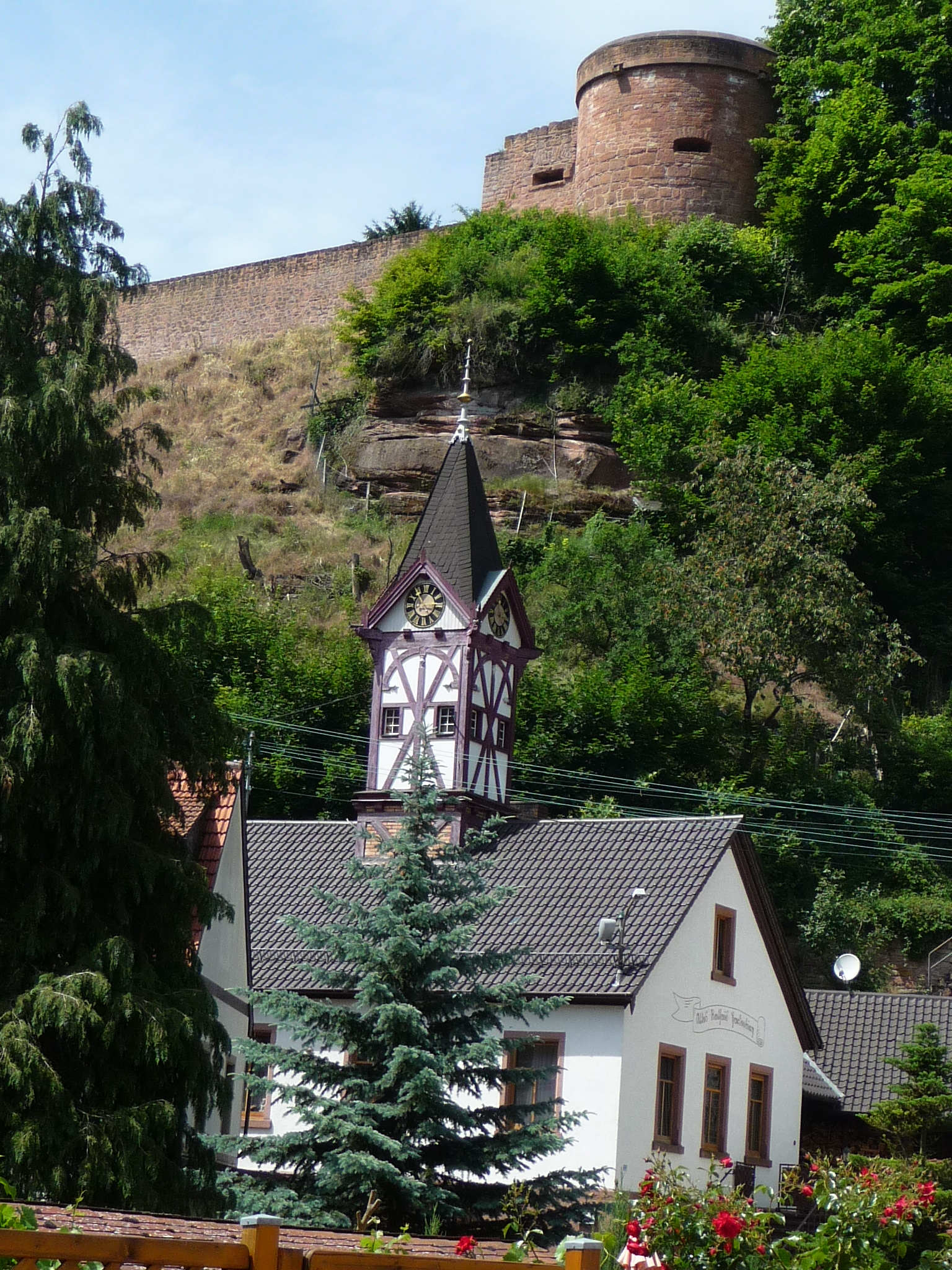 Hardenburg ist ein Stadtteil der rheinland-pfälzischen Kreisstadt Bad Dürkheim.